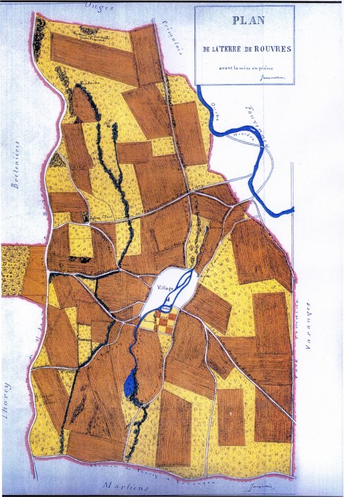 Rouvres_avant_remembrement.jpg